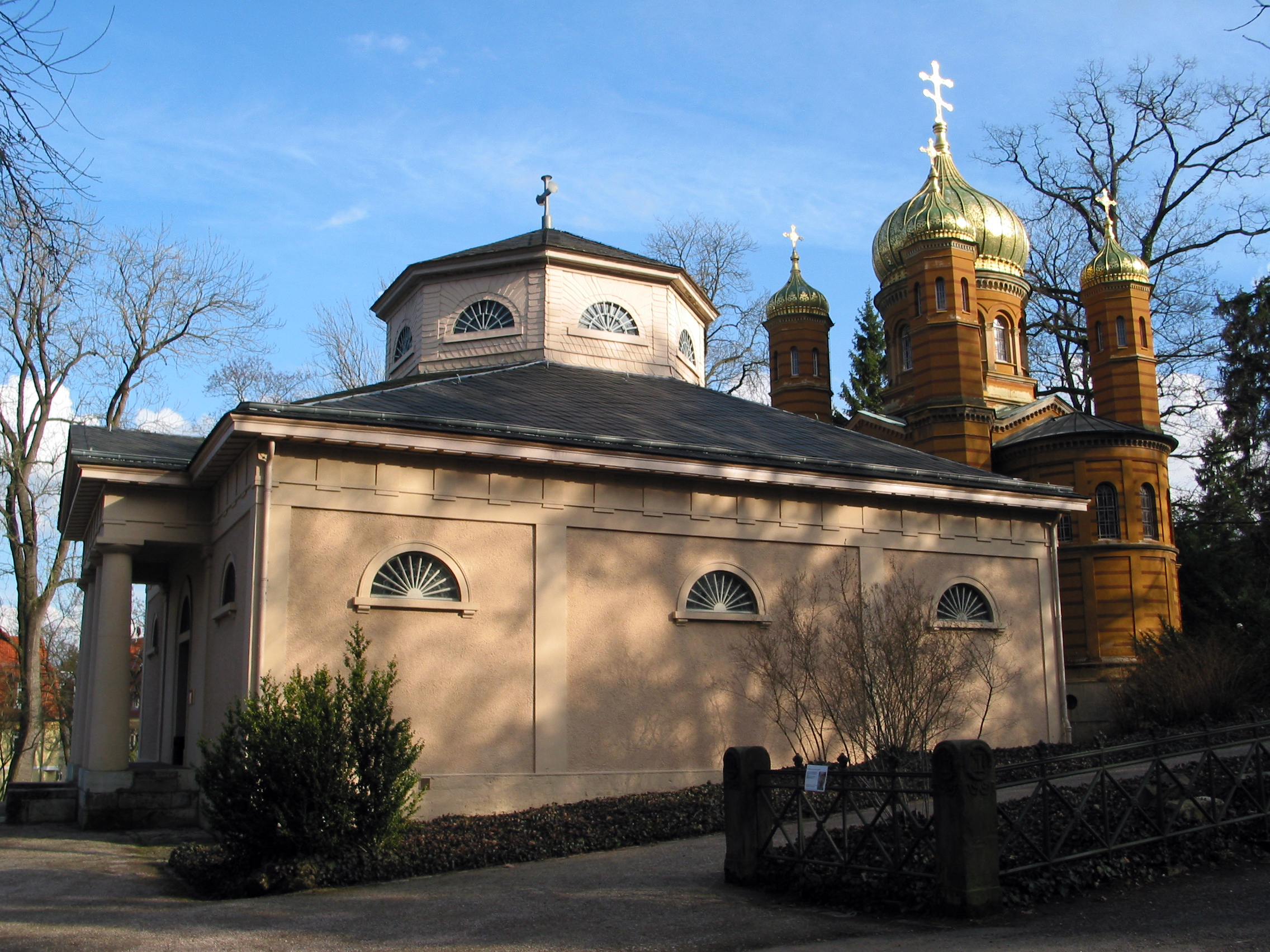 Klassizistische Fürstengruft (Goethe & Schiller) mit angrenzender Russisch-Orthodoxer Kapelle in Weimar